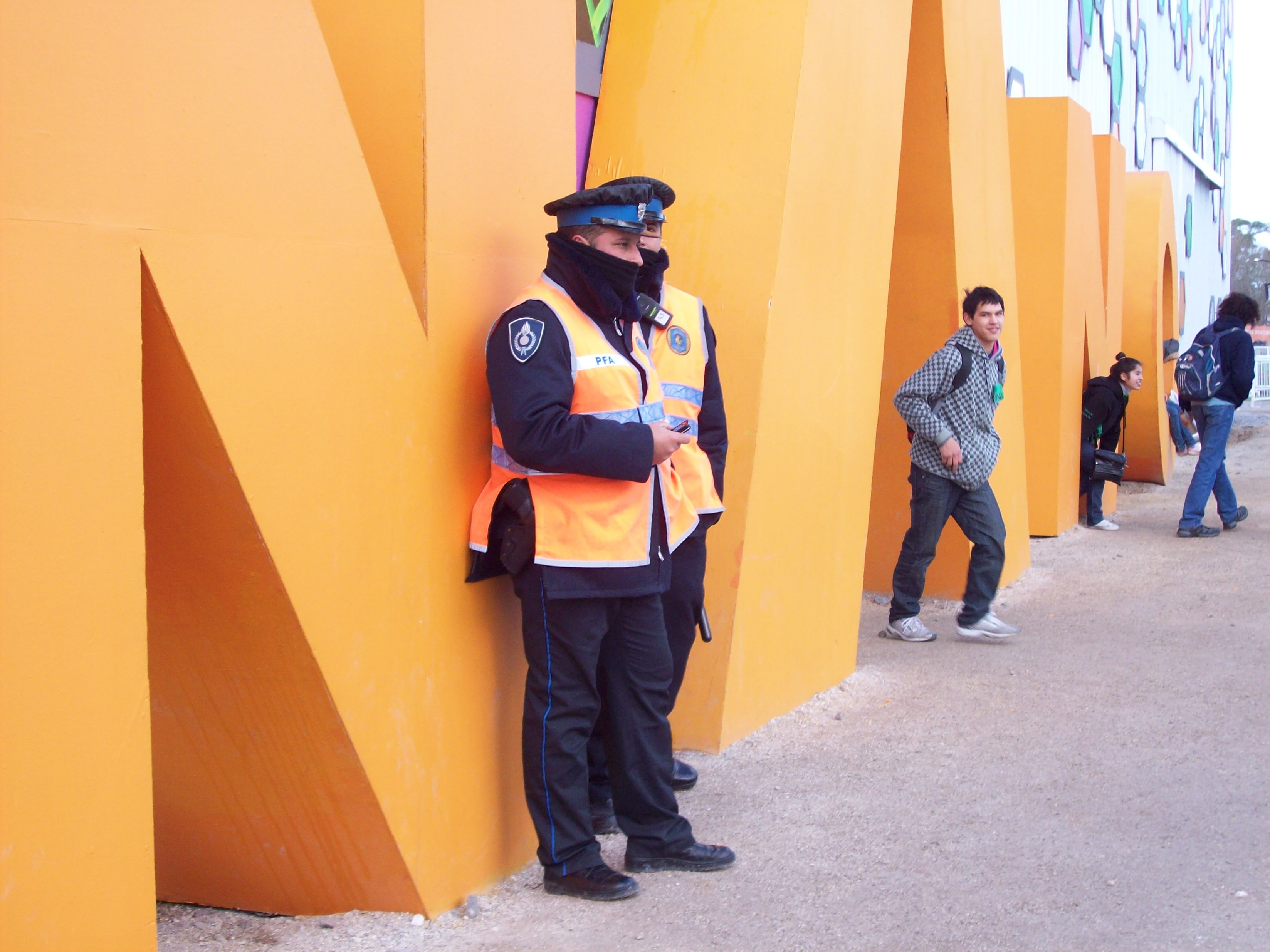 Policía en Tecnópolis.